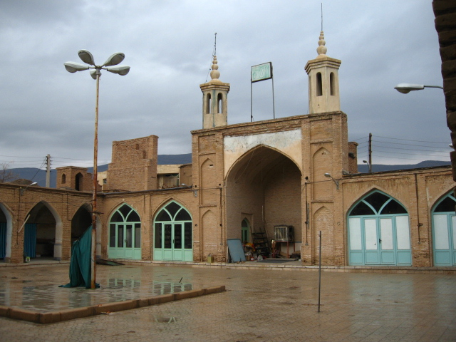 مسجد جامع ارسنجان 1